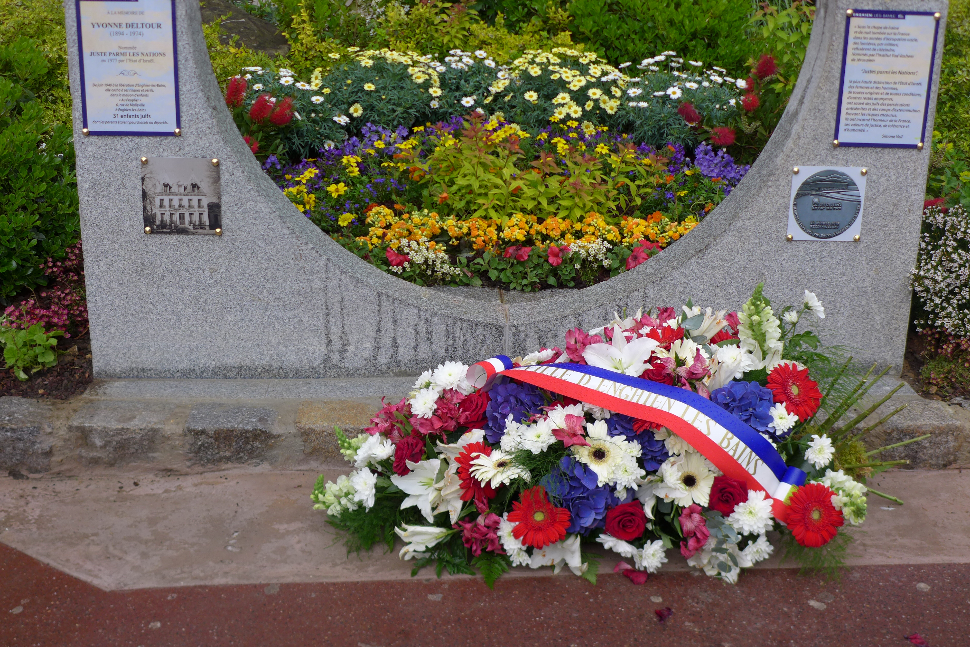 Stèle commémorative à Yvonne Deltour, juste parmi les nations, qui a caché, et sauvé, 31 enfants juifs de 1940 à 1945. Inauguration le 29 avril 2018, à Enghien-les-Bains (Val d'Oise).